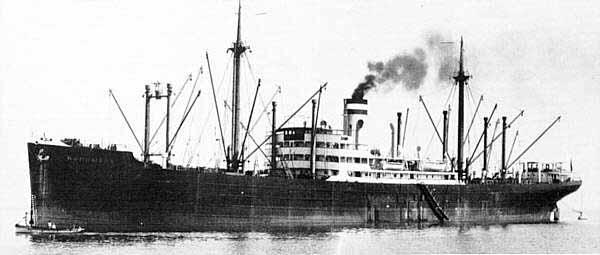 Der FrachterNORDMARK der Hapag